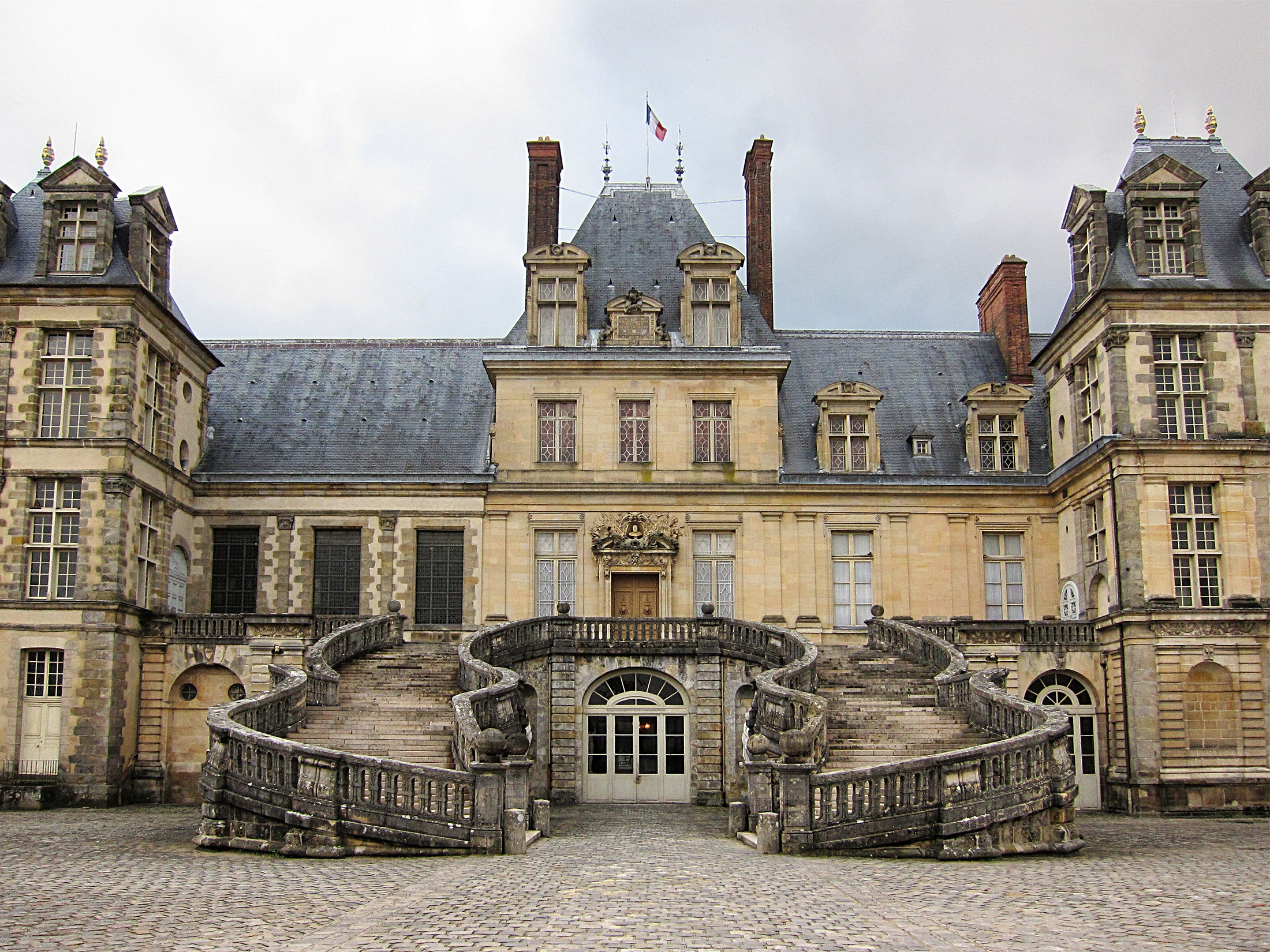 L'escalier d'entrée du palais de Fontainebleau.